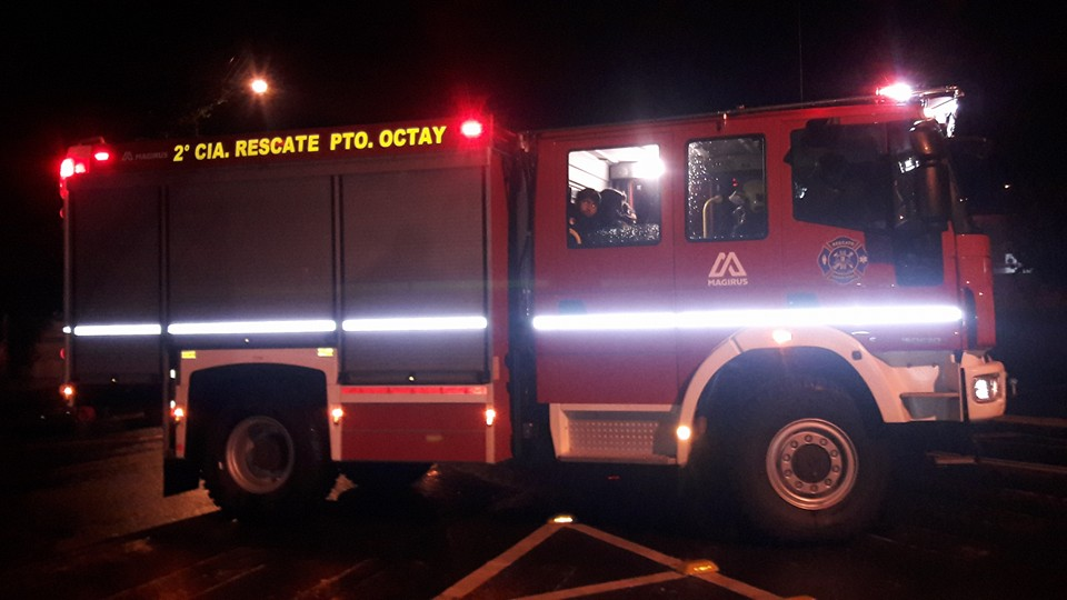 Carros de Bomberos